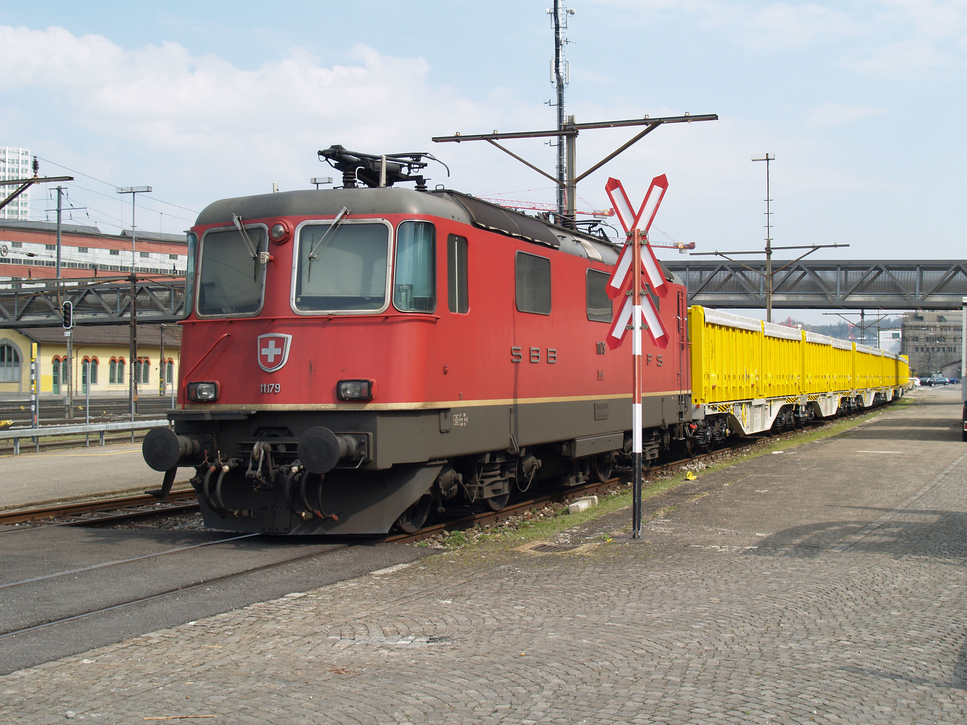 Der Cargo-Pendelzug der Firma Marti Infra AG, abgestellt in Winterthur GB. Mit der abgerüsteten elektrischen Zuglok (SBB Cargo Re 4/4 II 11179) voran.